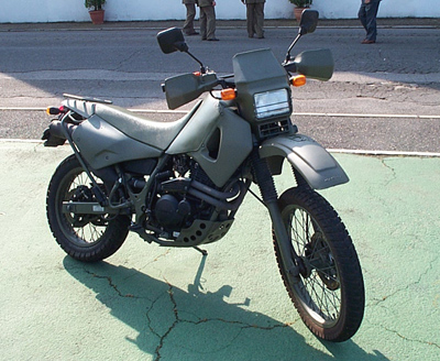 Moto dell'Esercito italiano - Cagiva W12 350 del 1992 in versione militare